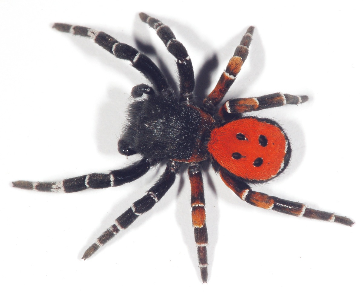 Eresus kollari, Pfungstädter Düne, Pfungstadt, Hessen, Deutschland